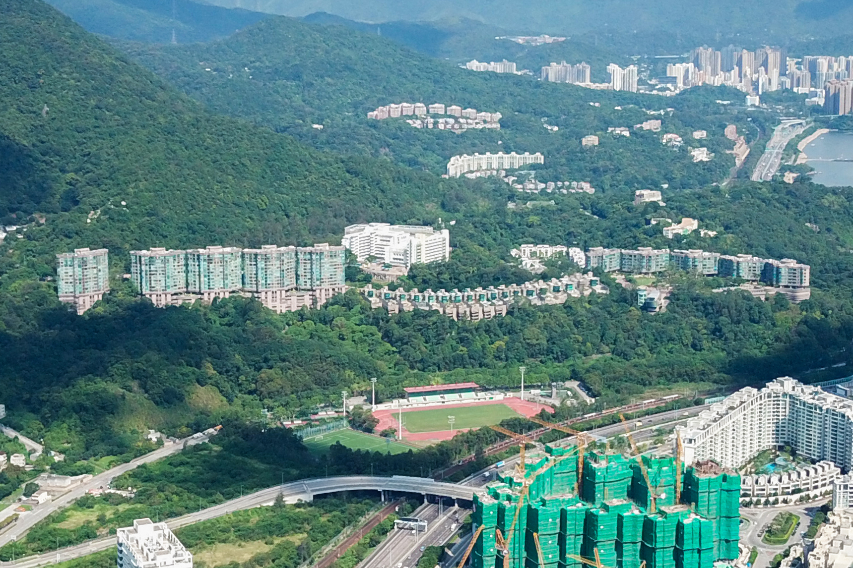 Deerhill Bay